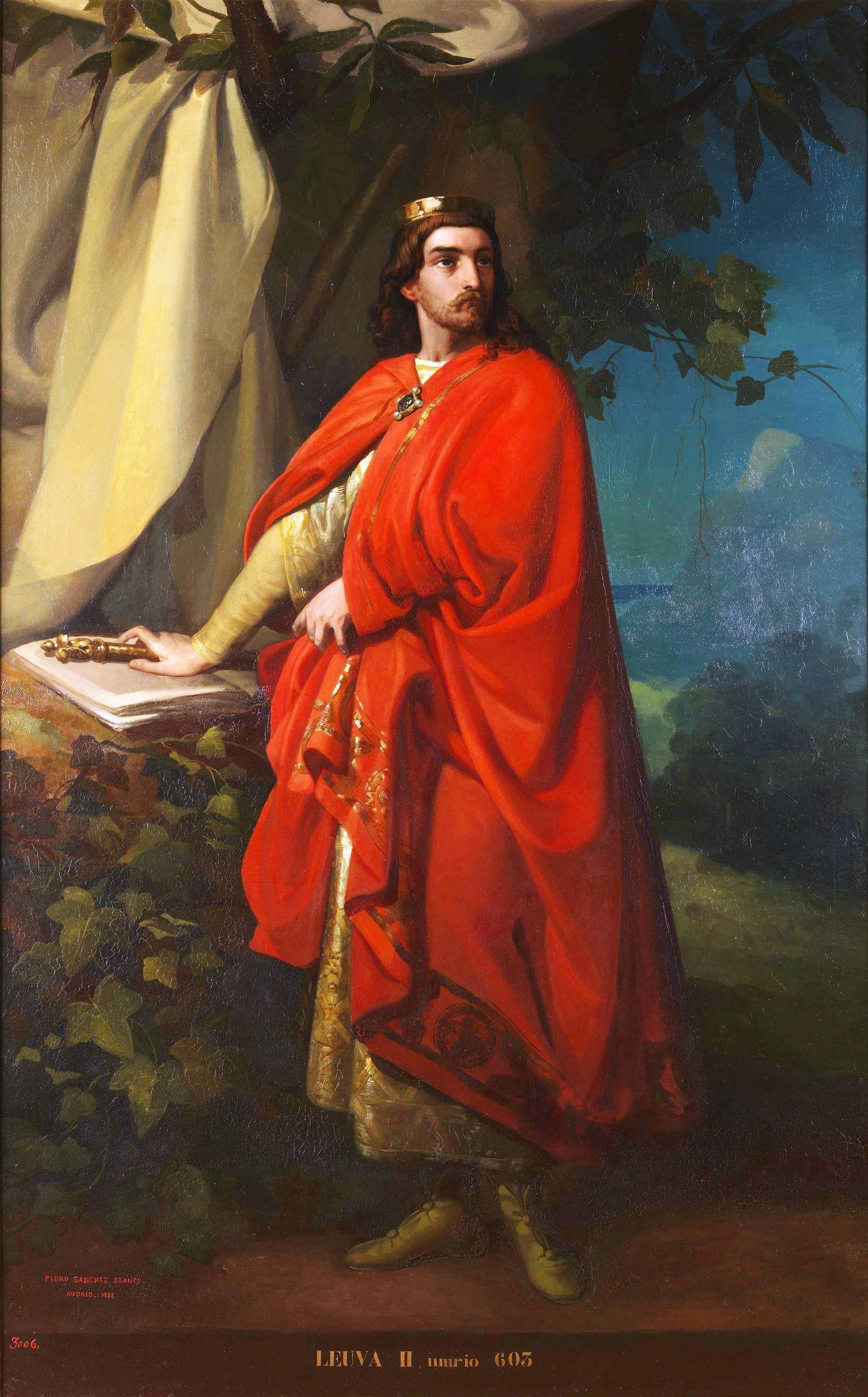 Retrato imaginario de Liuva II (583-603), que fue rey de los Visigodos y también hijo y sucesor del rey Recaredo. En el año 603 fue ejectudado por orden del rey Witerico, que previamente ordenó que se le cortara una mano.